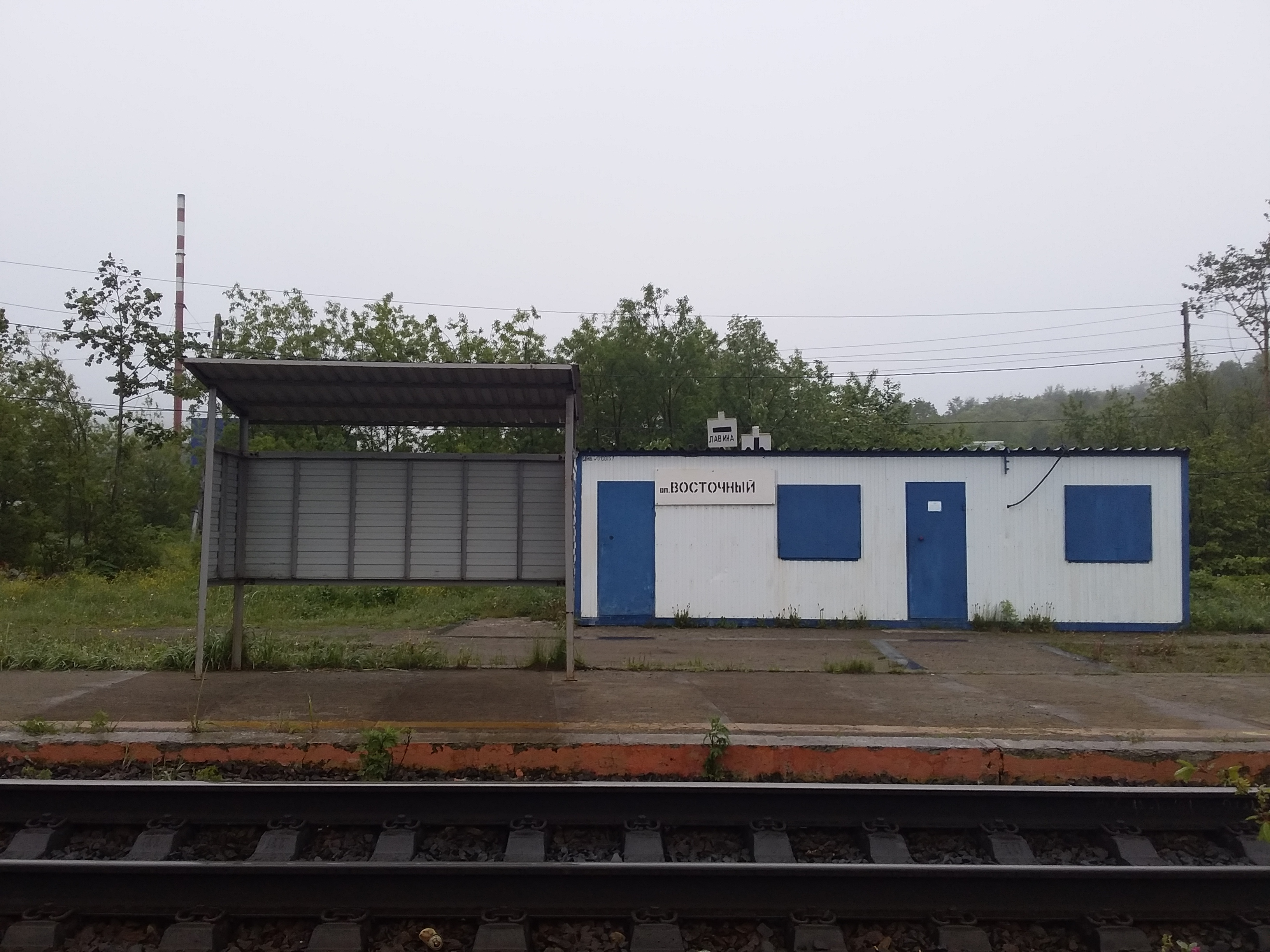 Сахалинский регион ДВЖД, платформа Восточное